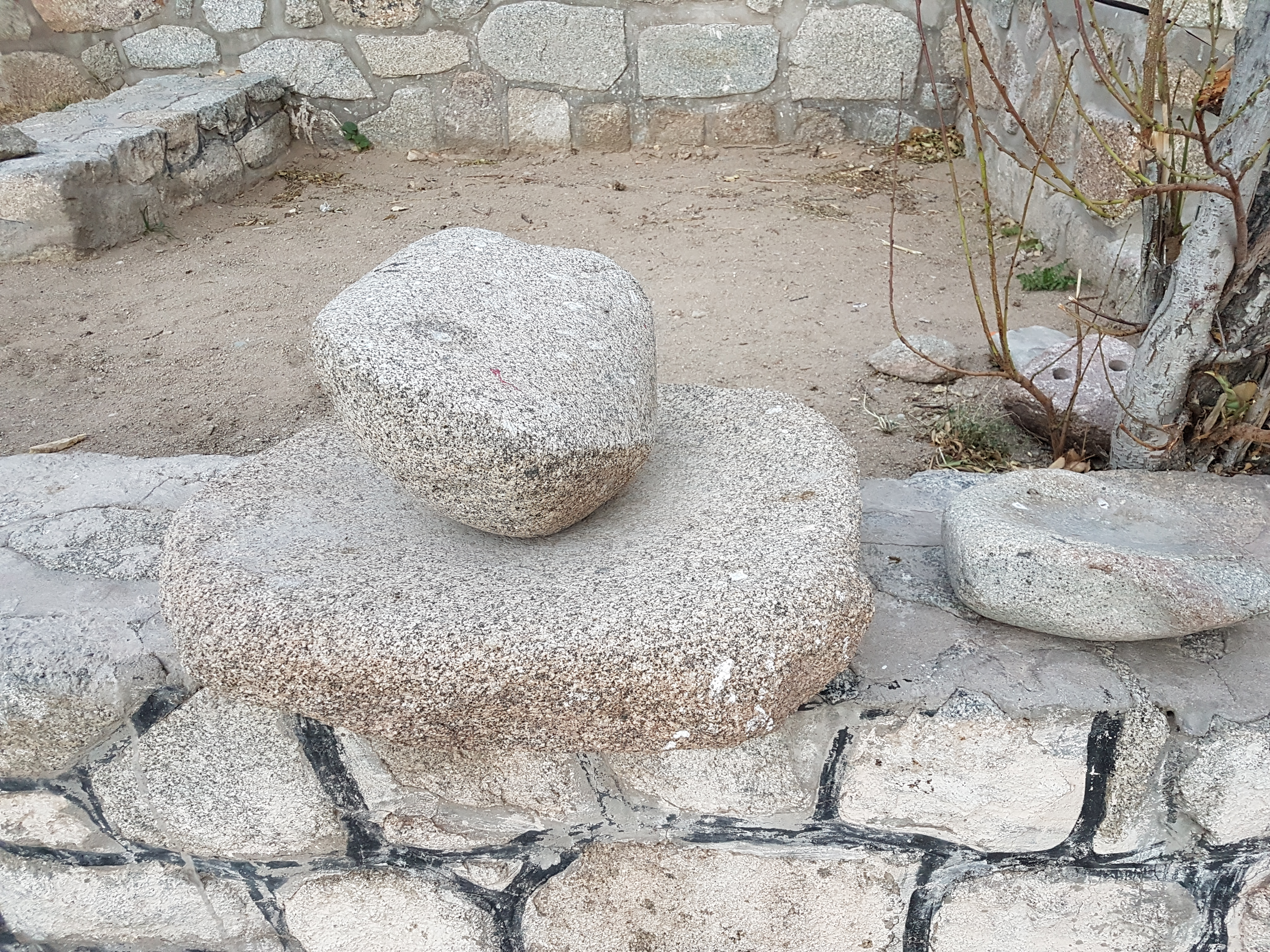 monumento cultural. lugares